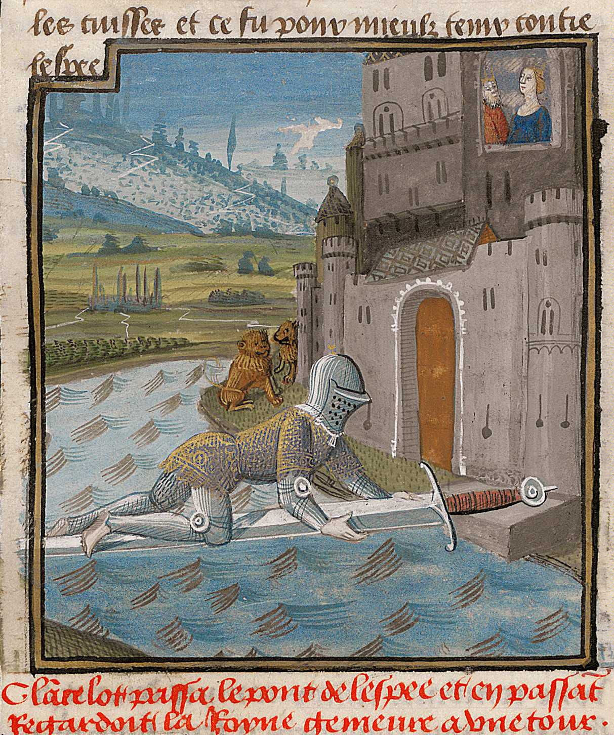 Lancelot passant le pont de l'Épée, enluminure d'un manuscrit en quatre volumes réalisés pour Jacques d'Armagnac, duc de Nemours. Atelier d'Evrard d'Espinques. Centre de la France (Ahun), vers 1475.